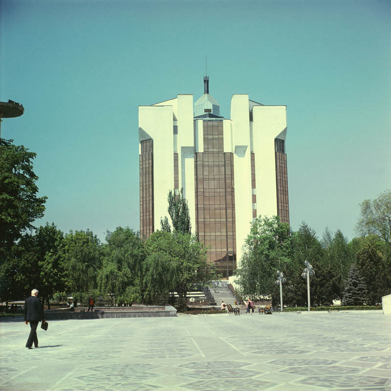 Chisinau - 12 (1993).